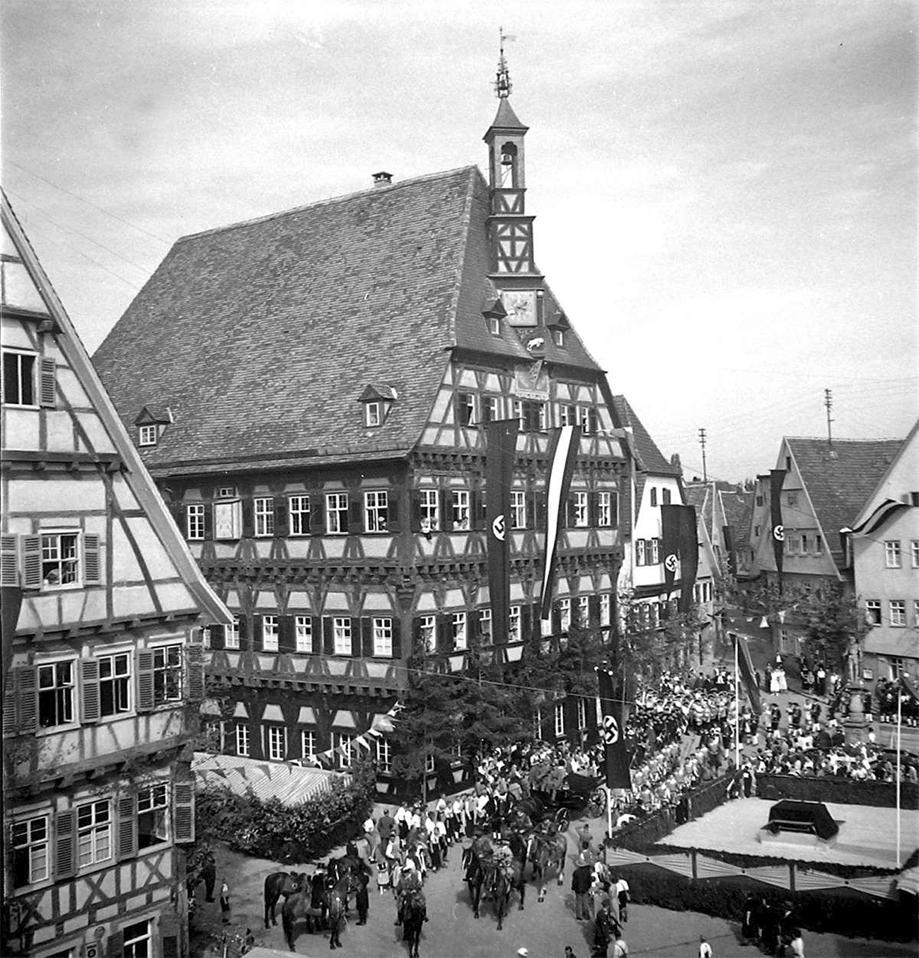 Hakenkreuz-Beflaggung des Marktplatzes während des Markgröninger Schäferlaufs um 1940